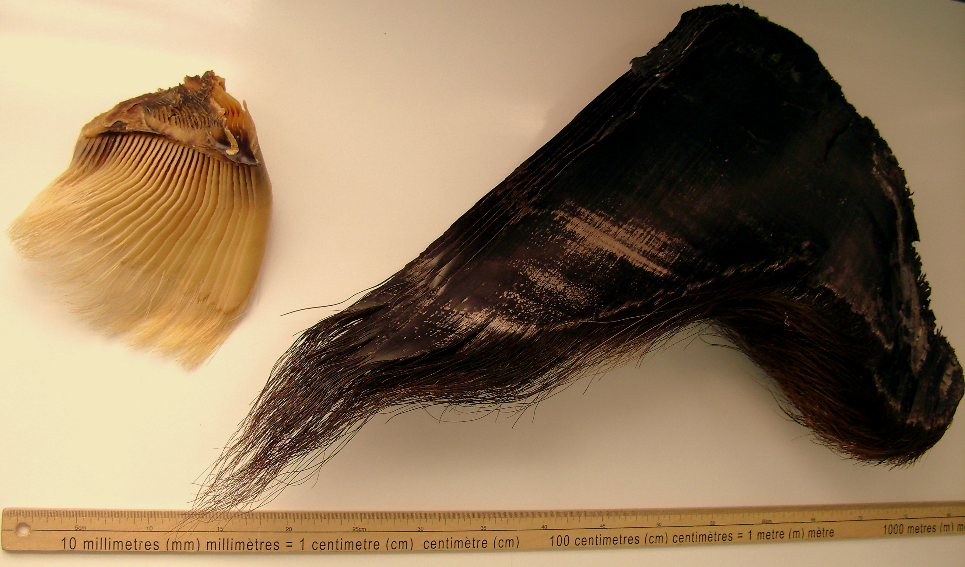 Comparaison entre les fanons d'un petit rorqual (gauche) et ceux d'un rorqual bleu (droite)